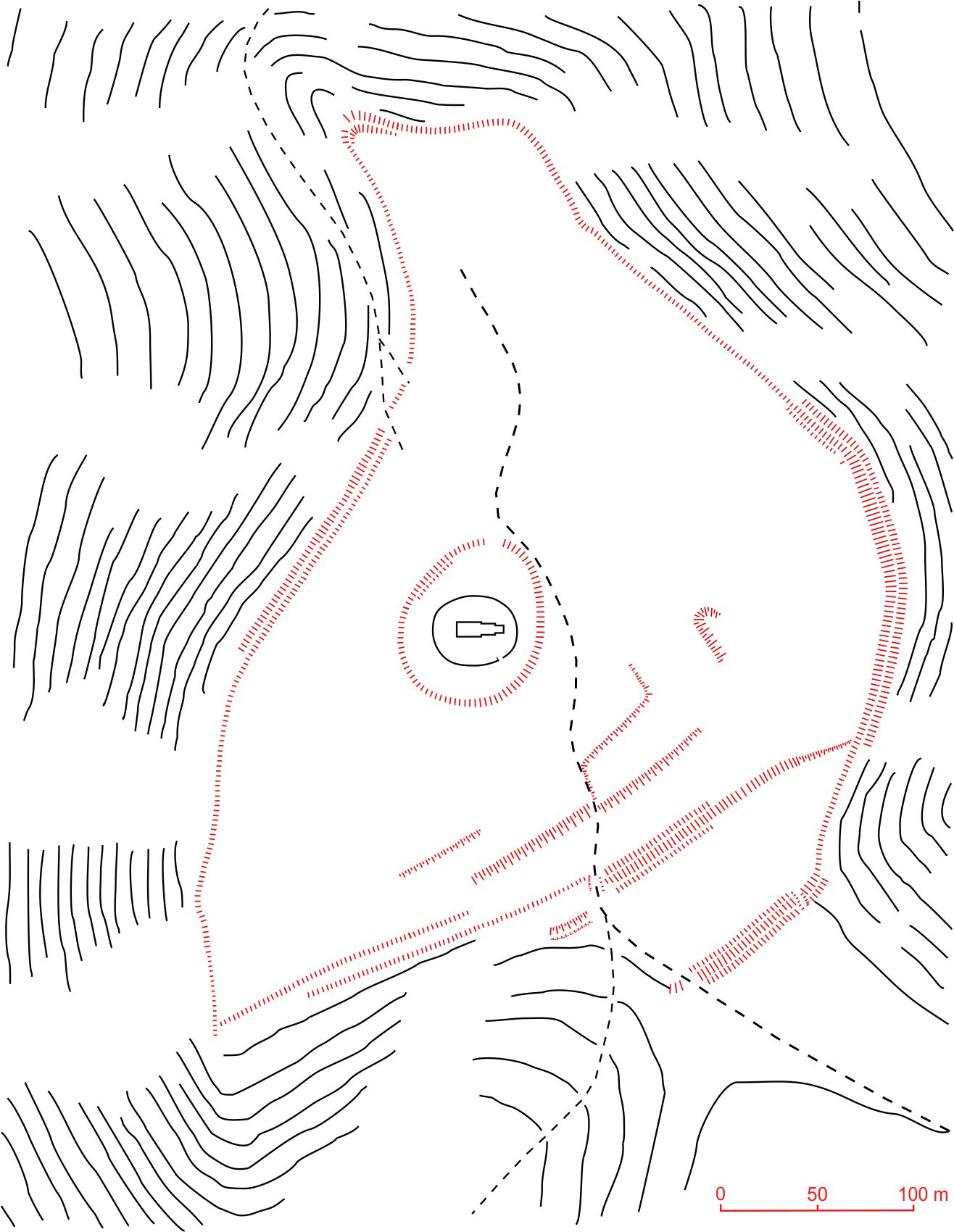 schematische Darstellung der Topographie des Michelsberges bei Münnerstadt mit den Resten der noch sichtbaren Befestigungsanlangen und der Ruine der Michelskapelle (Inspiriert durch die Aufnahme des Bayerischen Landesvermessungsamtes M. Kirmaier 1985).